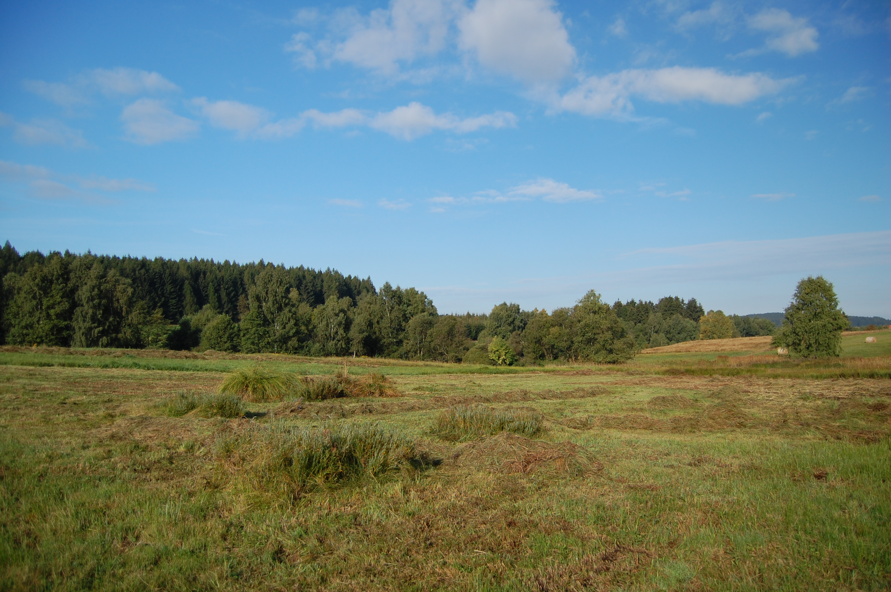 Přírodní rezervace Uhliska, Horní Štěpánov, okres Prostějov